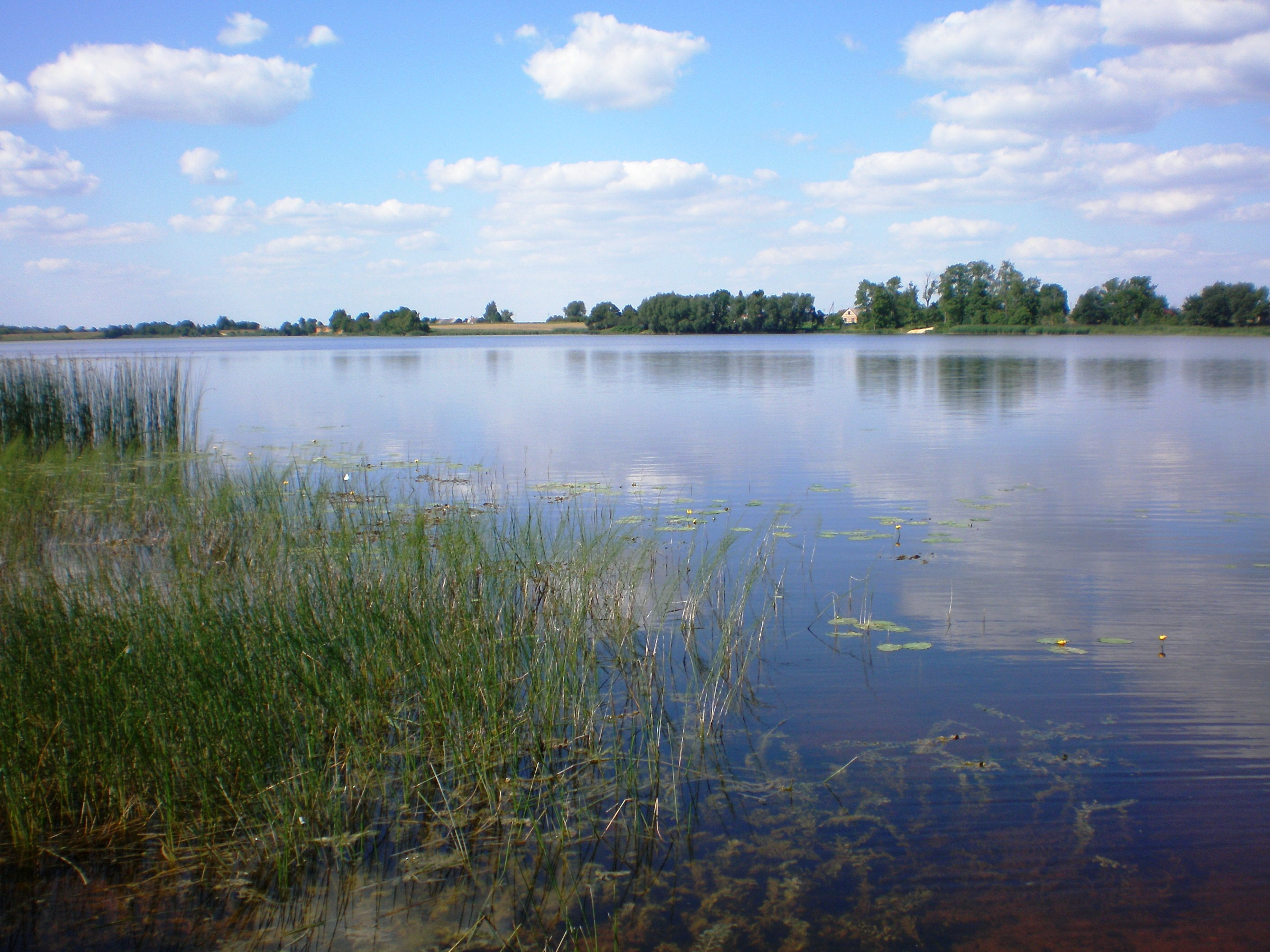 Angirių tvenkinys netoli Angirių, Kėdainių raj.